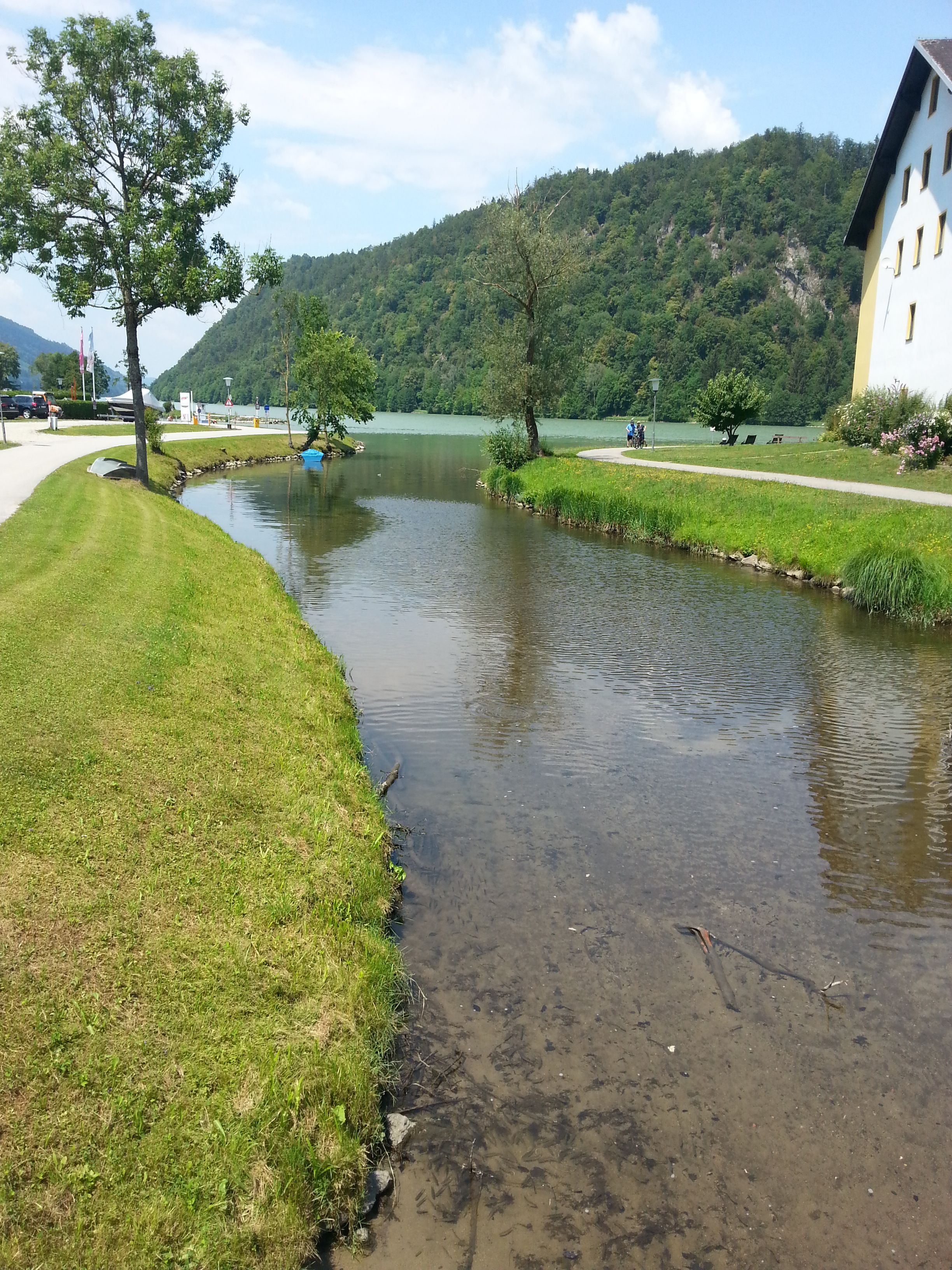 Mündung des Andlersbach in die Donauschlinge bei Schlögen.